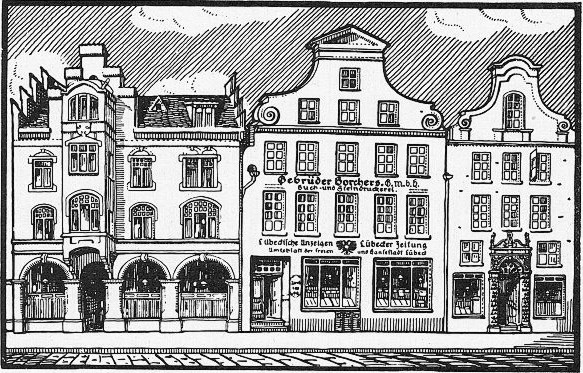 Die drei Gebäude der Firma